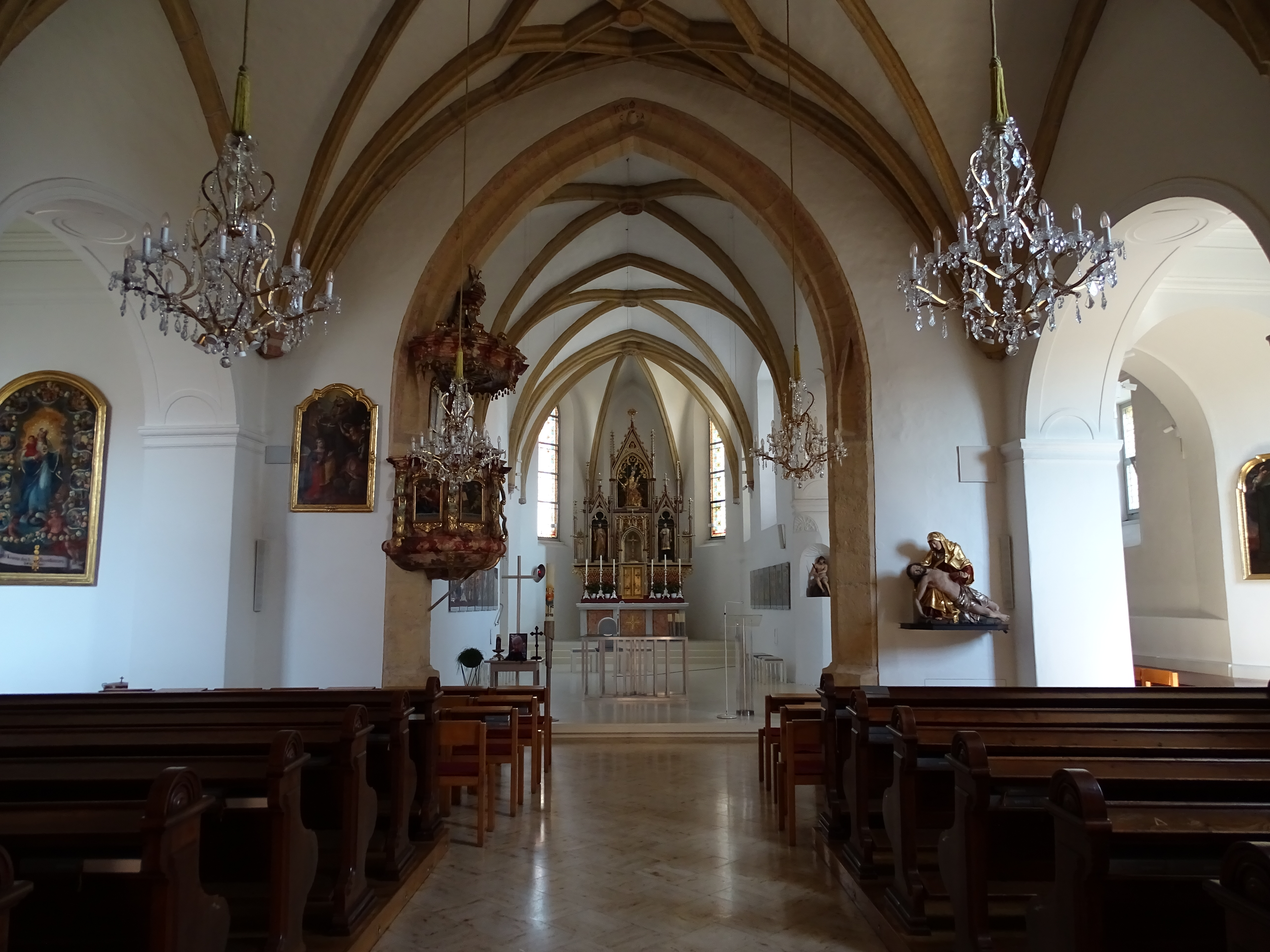 Der Innenraum der Pfarrkirche Hitzendorf